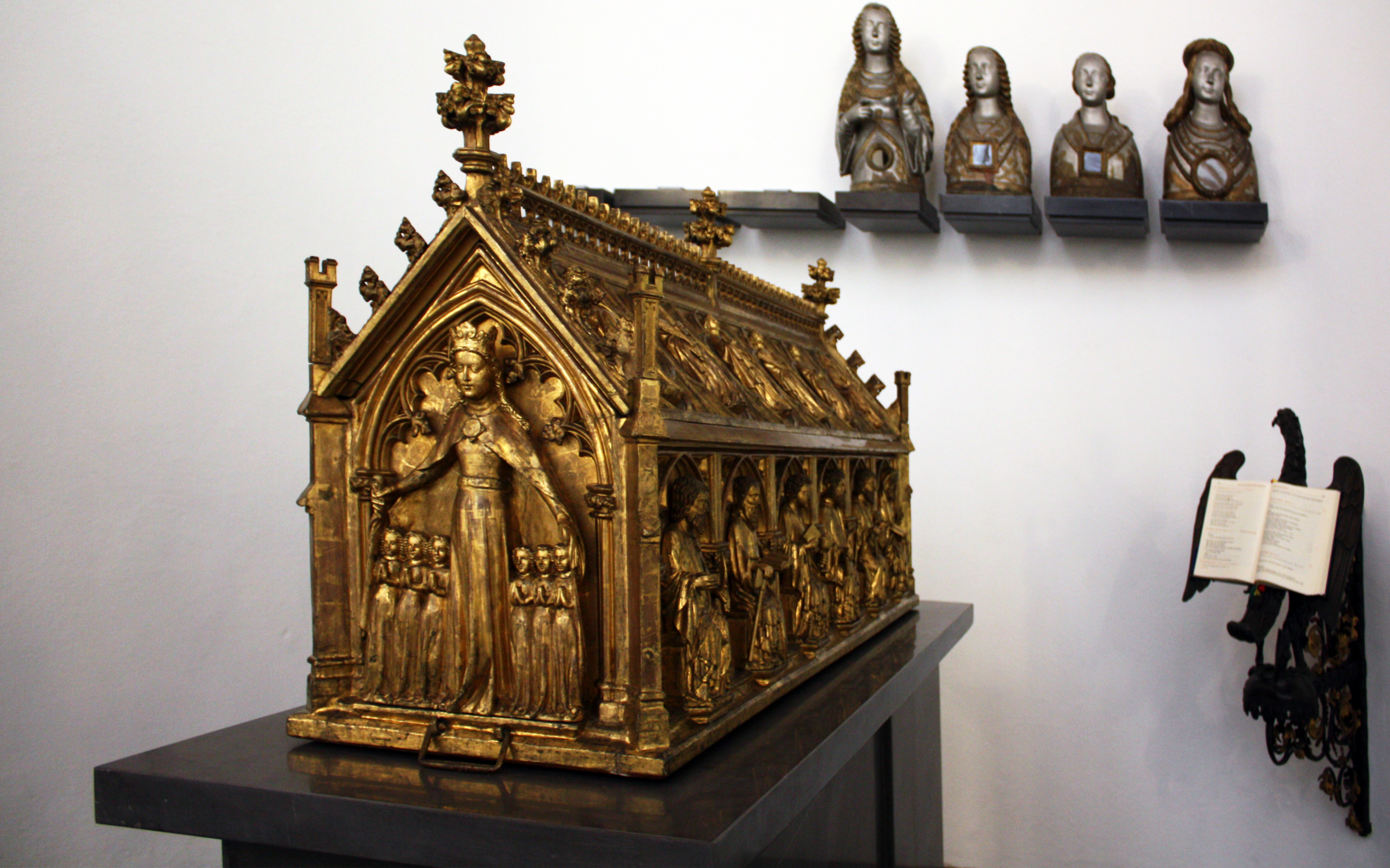 St. Johann-Baptist, Köln. Gotischer Antoninaschrein im Chor der neugestalteten Kirche